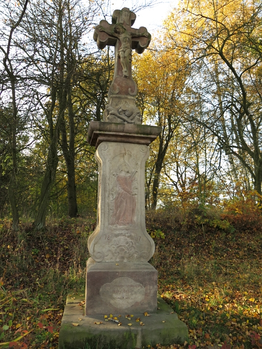 Sloup se sousoším - kříž se sochami dvou andělů, západní okraj osady Leština u silnice do Rakova, Leština (Markvartice).